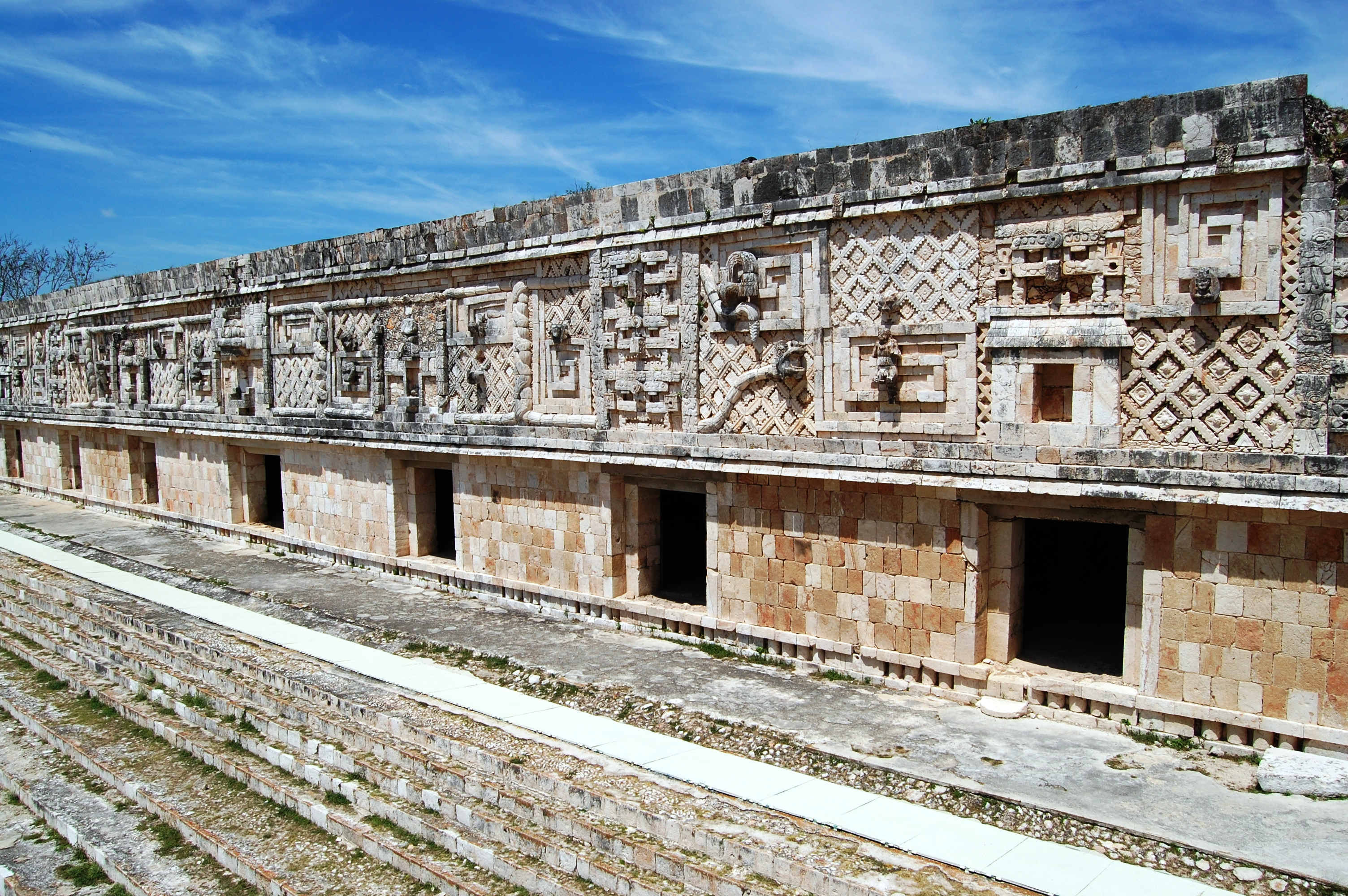 Uxmal, Mexico Cuadràngulo de las Monjas